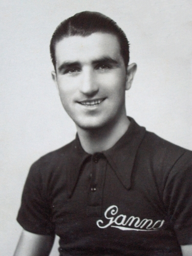 Cesare Del Cancia